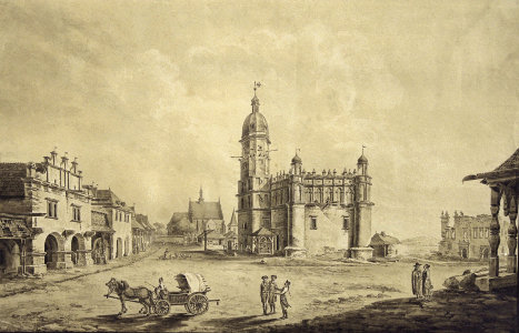 Rycina przedstawiający rynek w Szydłowcu z 1795 r.